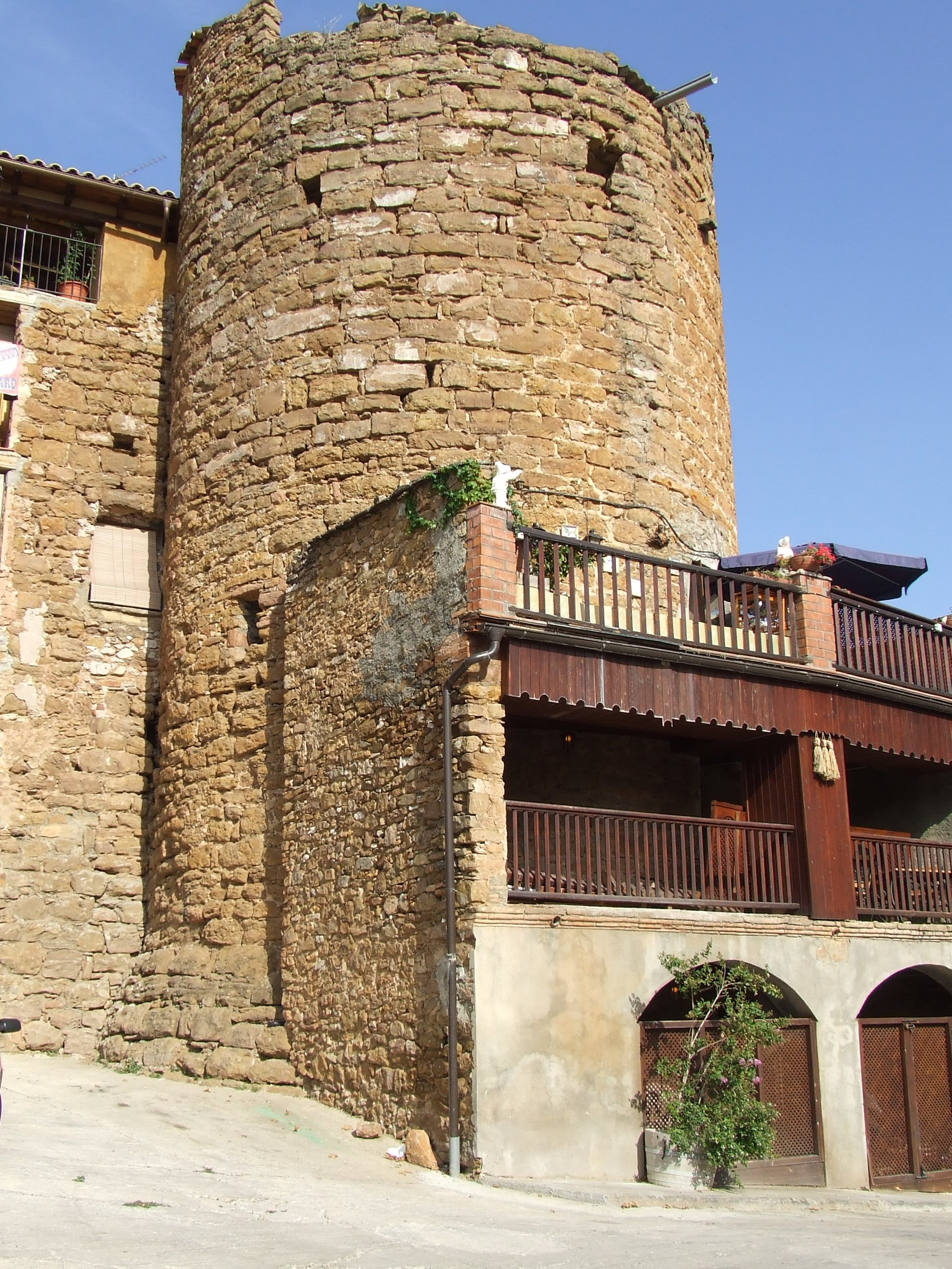 Torre de Soldevila (Talarn, Pallars Jussà)